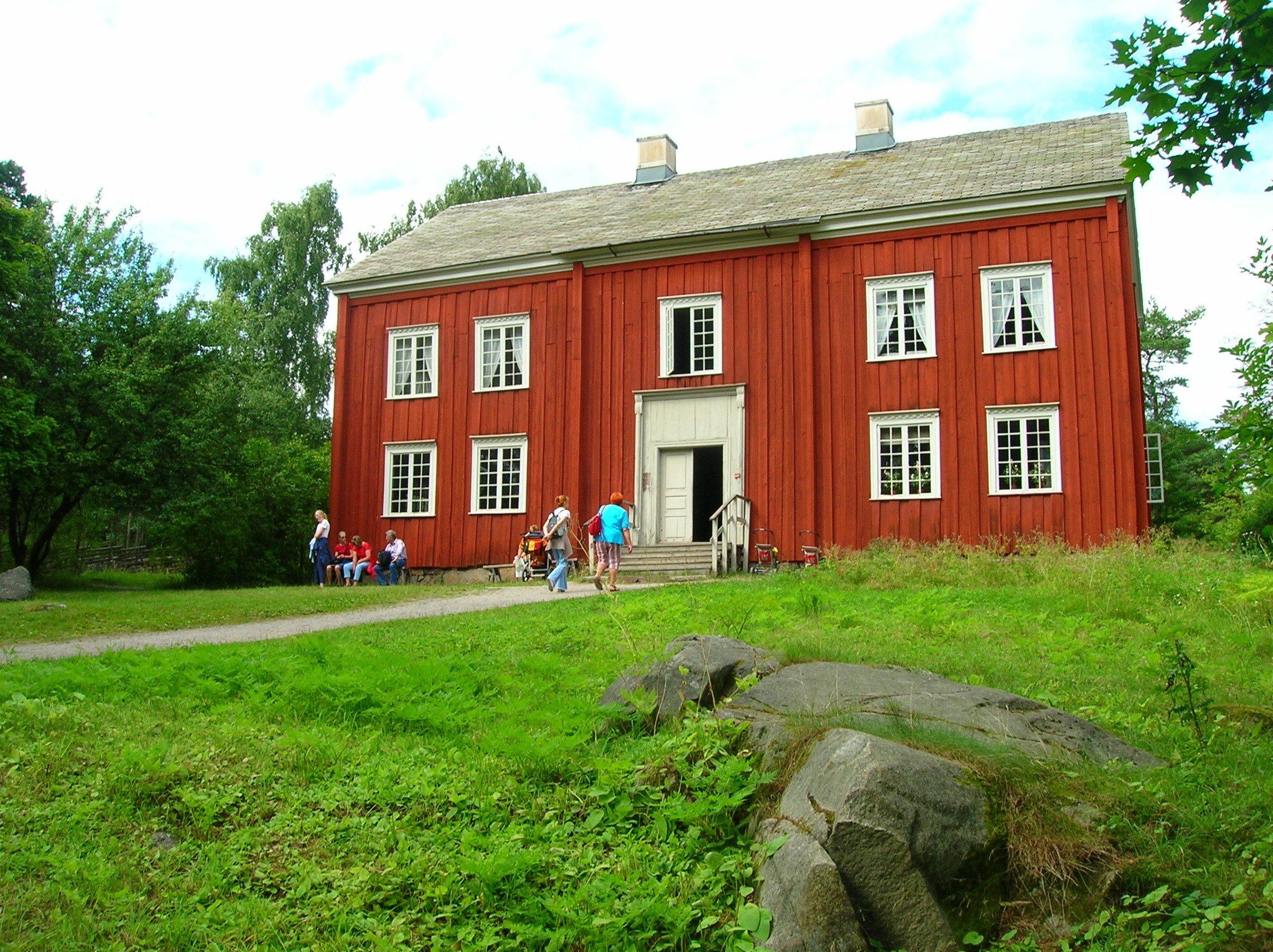 Ekshäradsgården, Skansen, Stockholm